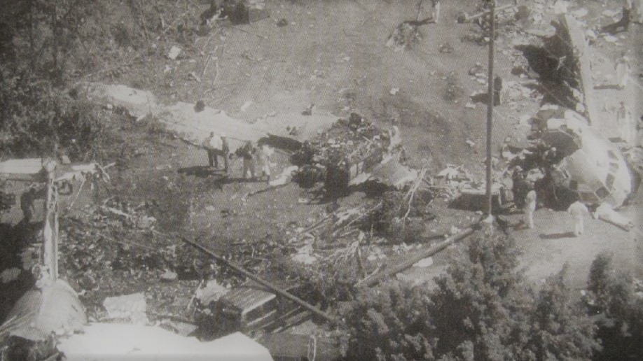 Relitto del Volo USAir 1016